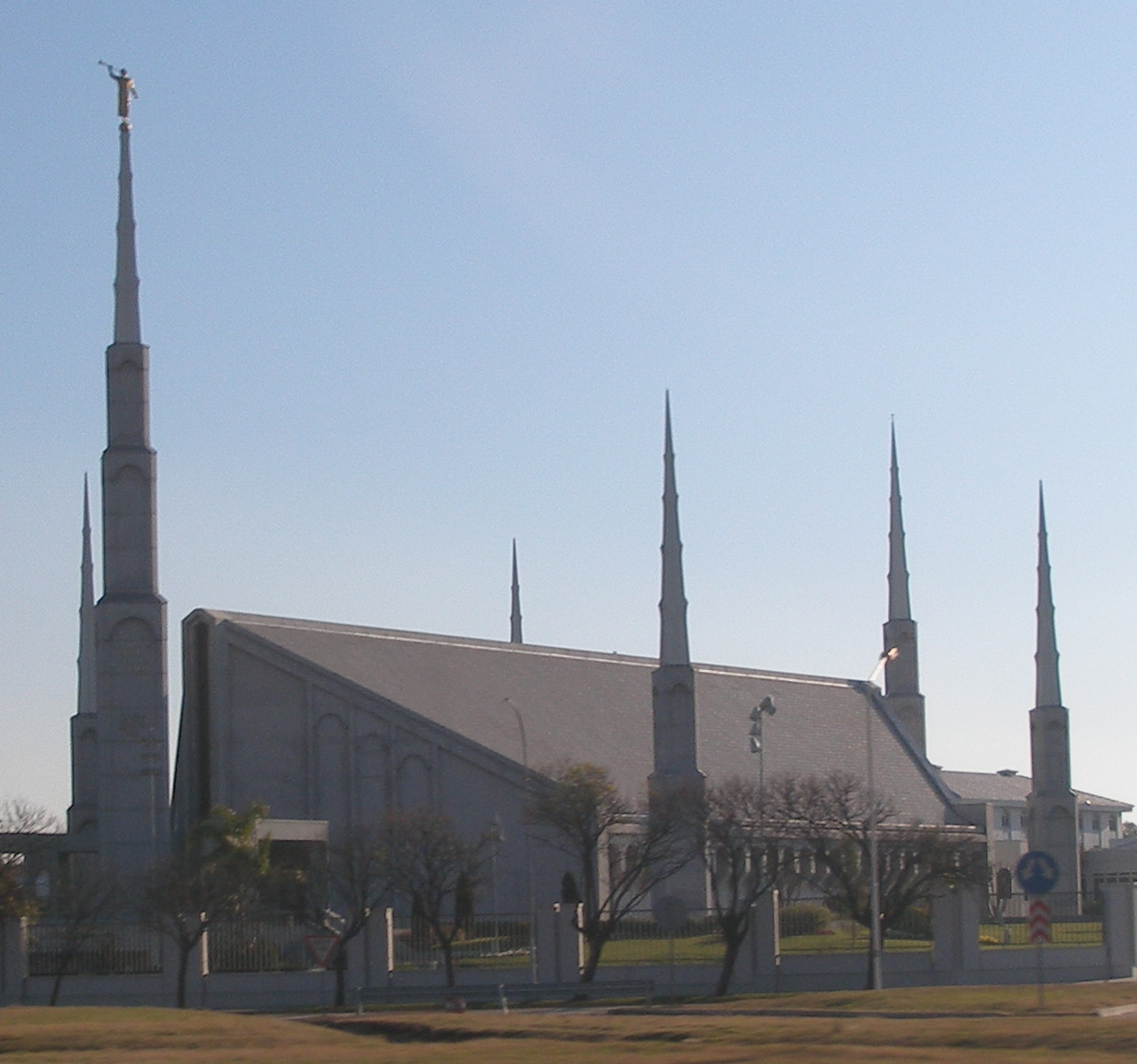 The Buenos Aires Argentina Temple